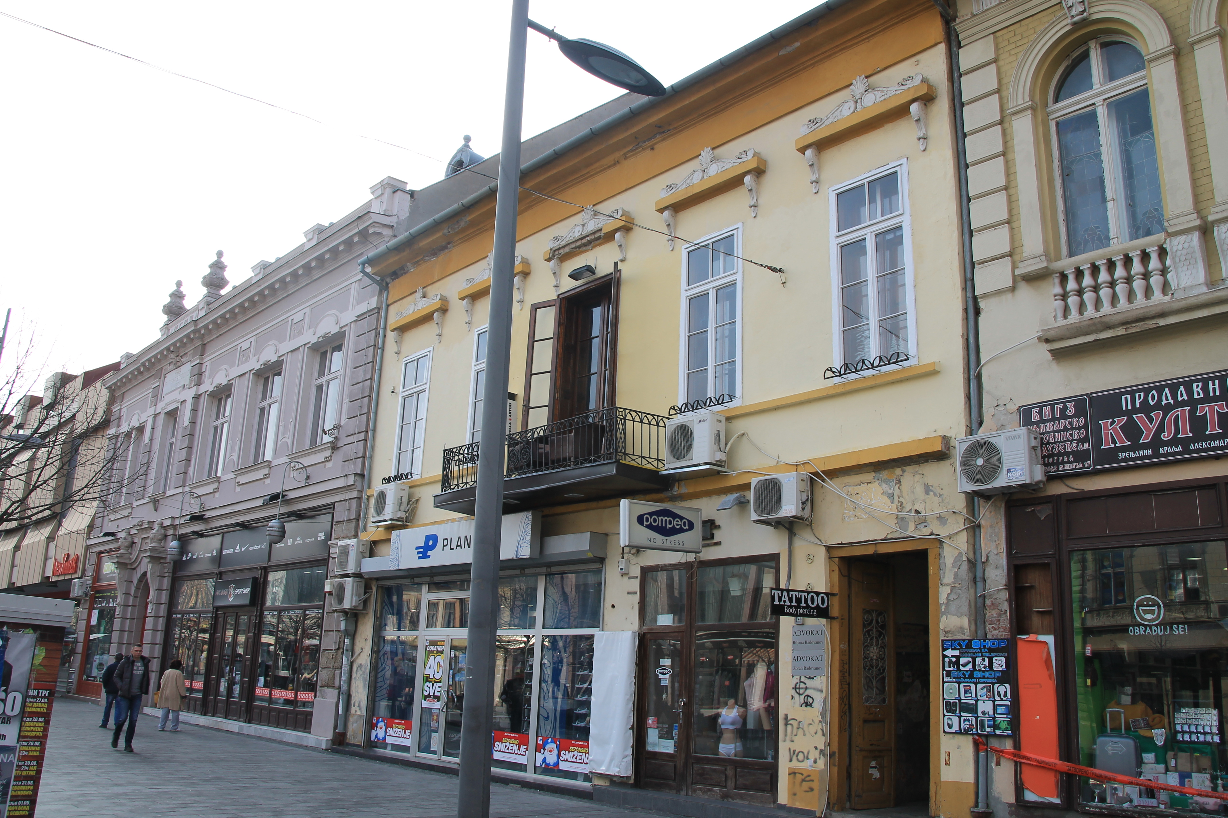 Staro jezgro Zrenjanina